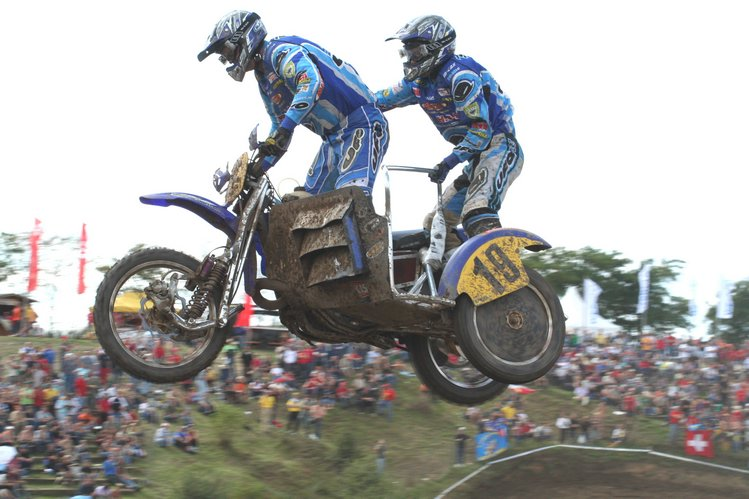 Zijspancross met veel publiek